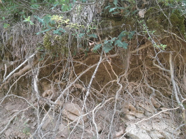 Roca madre del suelo. Tomada en La Pola de Gordón. León. España.